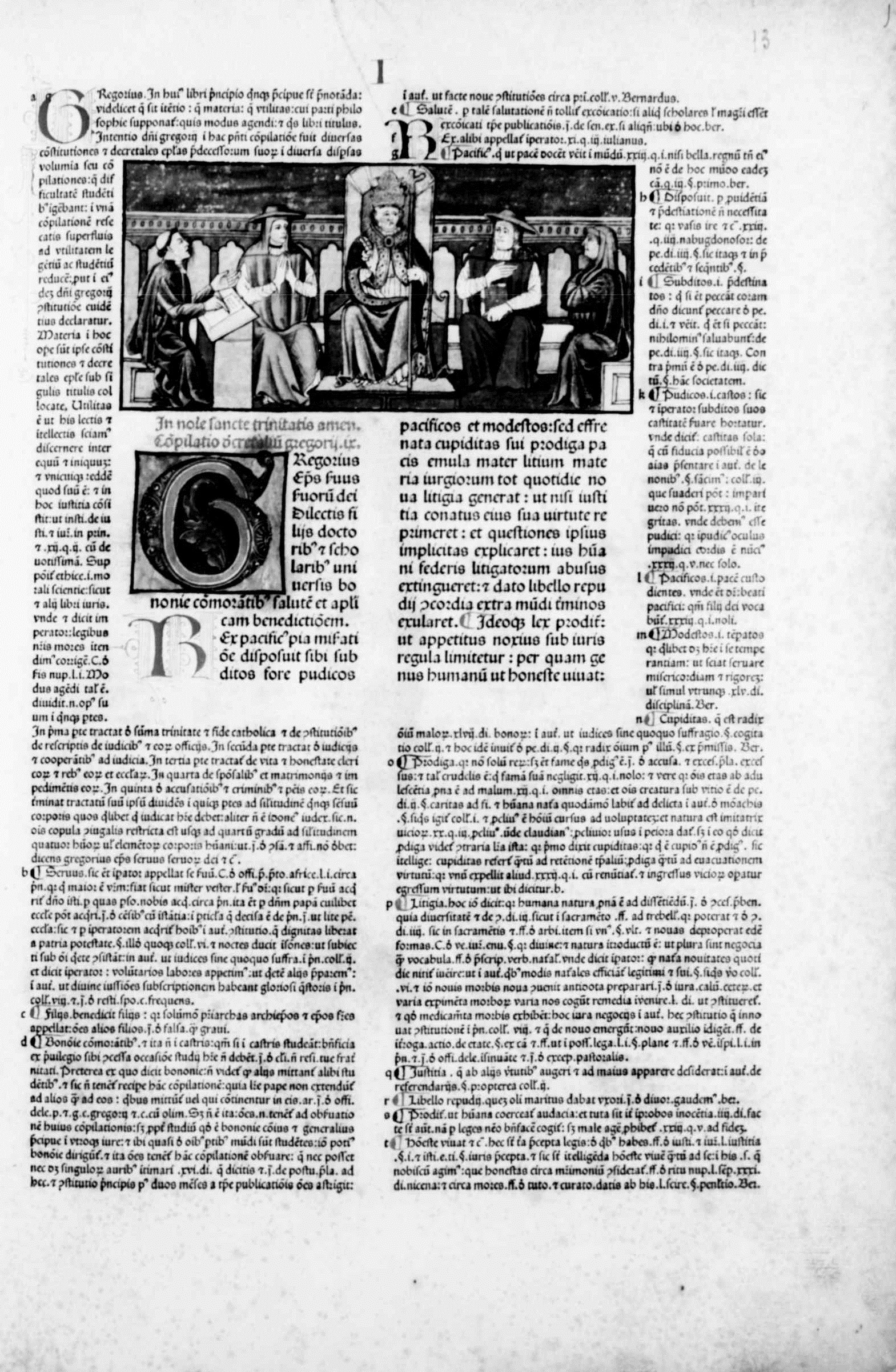 Pagina 1